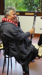 Catherine Delaunay, festival Kind of Belou, répétition, Treignac, 2016